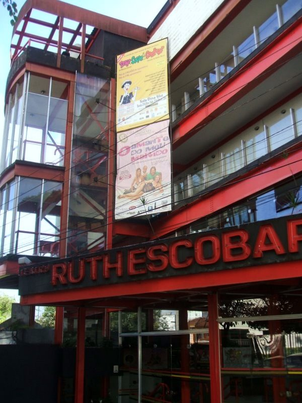 Teatro Ruth Escobar, bairro do Bixiga, São Paulo